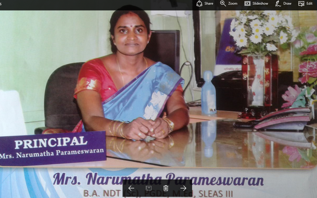 கல்லூரியின் தற்போதைய அதிபா் திருமதி. நா்மதா பரமேஸ்வரன்